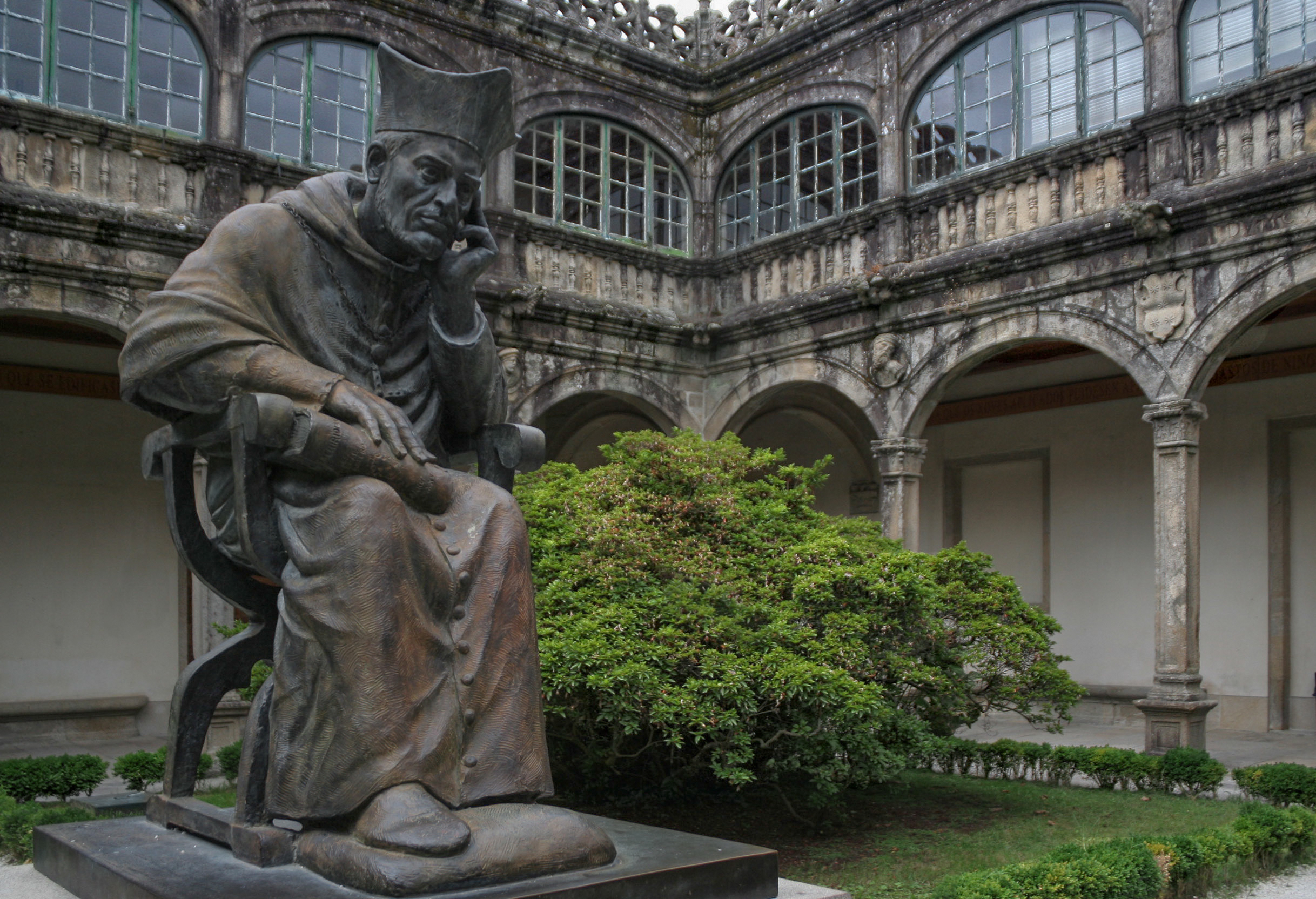 Colexio de Fonseca 16.Jhd. Dieses Collegium wurde auf Anweisung des Erzbischofs Alonso de Fonseca erbaut, der dazu das Haus, in dem er geboren worden war und das seiner einflussreichen Familie gehörte, zur Verfügung stellte. Die Lehrtätigkeit begann im Jahre 1544 und das Gebäude wurde zum Sitz der Universität von Compostela, die unter dem Protektorat seiner Familie zu Beginn des Jahrhunderts gegründet worden war